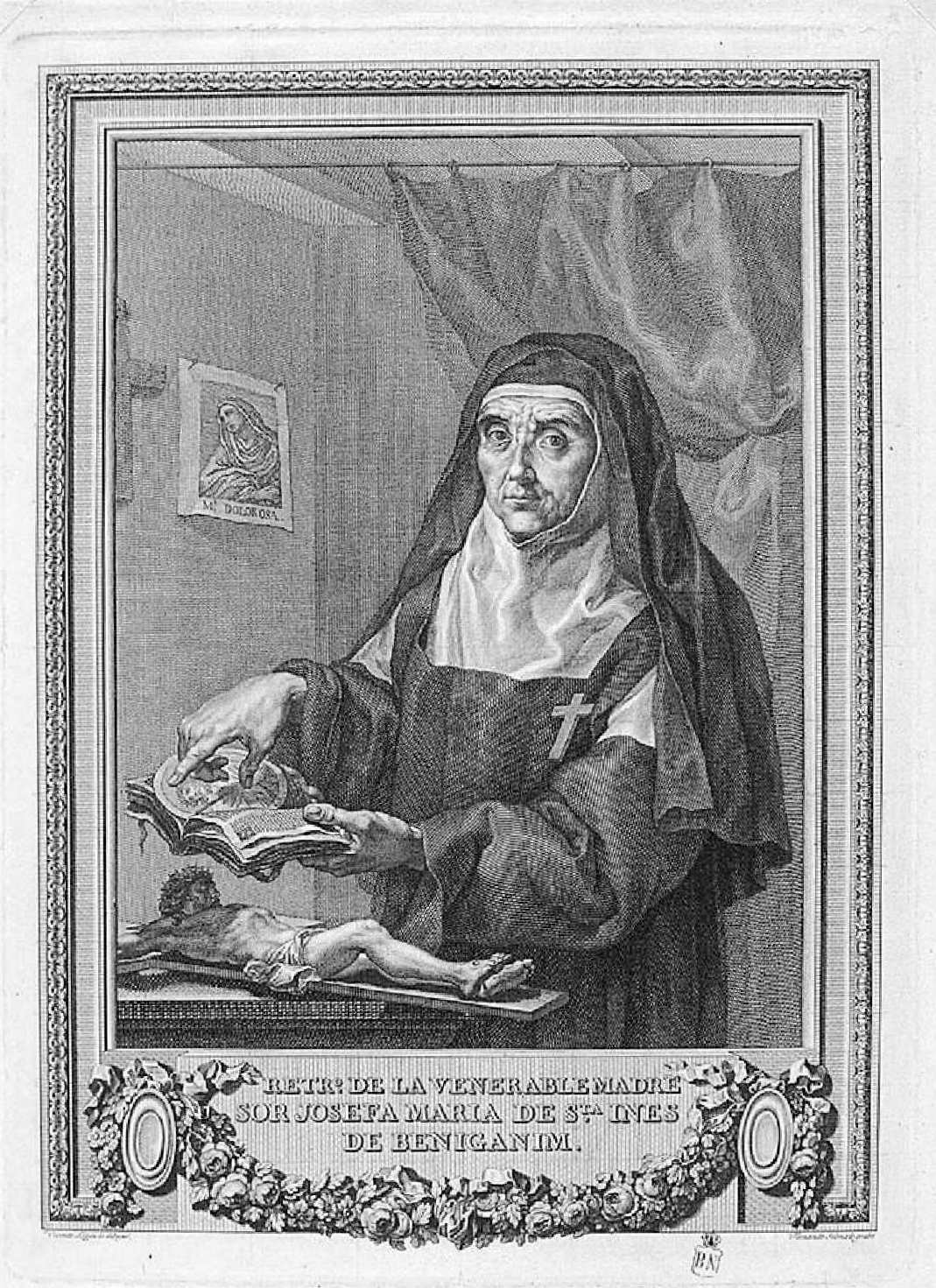 Retrato de la beata Josefa de Santa Inés de Benigánim, grabado de Fernando Selma por dibujo de Vicente López. Biblioteca Nacional de España